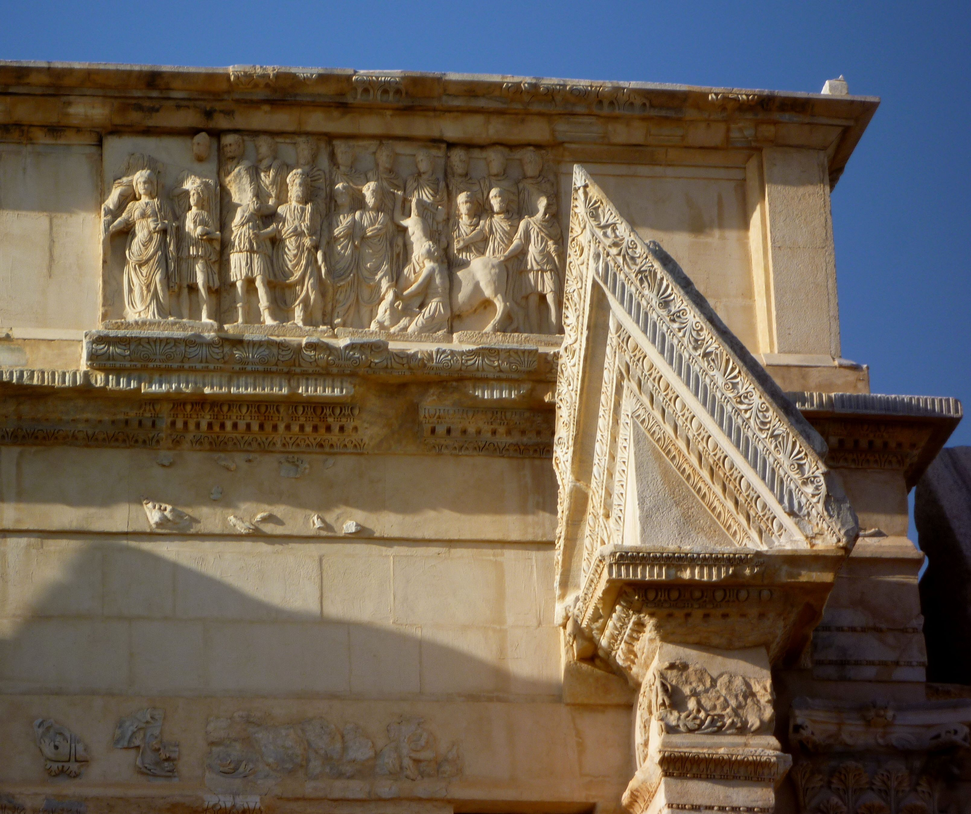 Leptis Magna - Triumphbogen des Septimius Severus 203 n. Chr.04